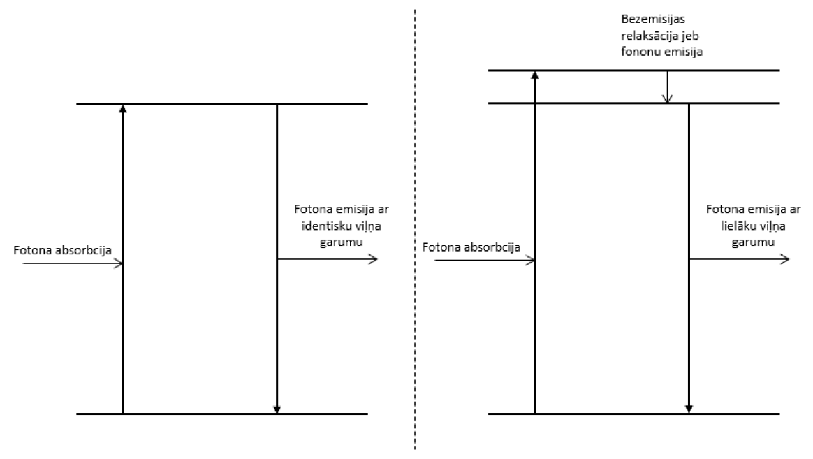 PL process